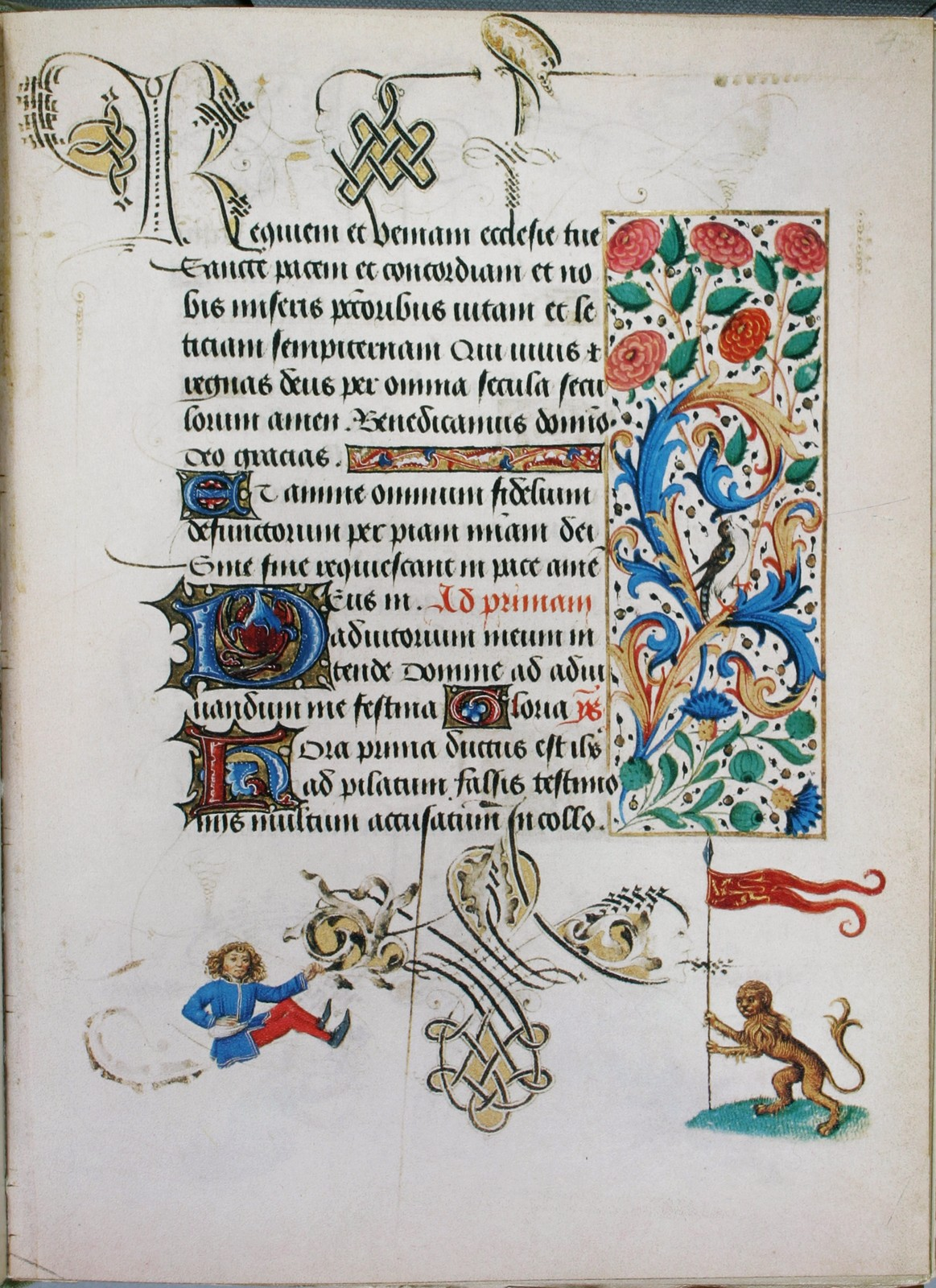 Wien, Österreichische Nationalbibliothek, cod. 1857, Stundenbuch der Maria von Burgund. In: Franz Unterkirchner (Hrsg.): Das Stundenbuch der Maria von Burgund. Codex Vindobonensis 1857 der Österreichischen Nationalbibliothek (Glanzlichter der Buchkunst), Darmstadt 1993.